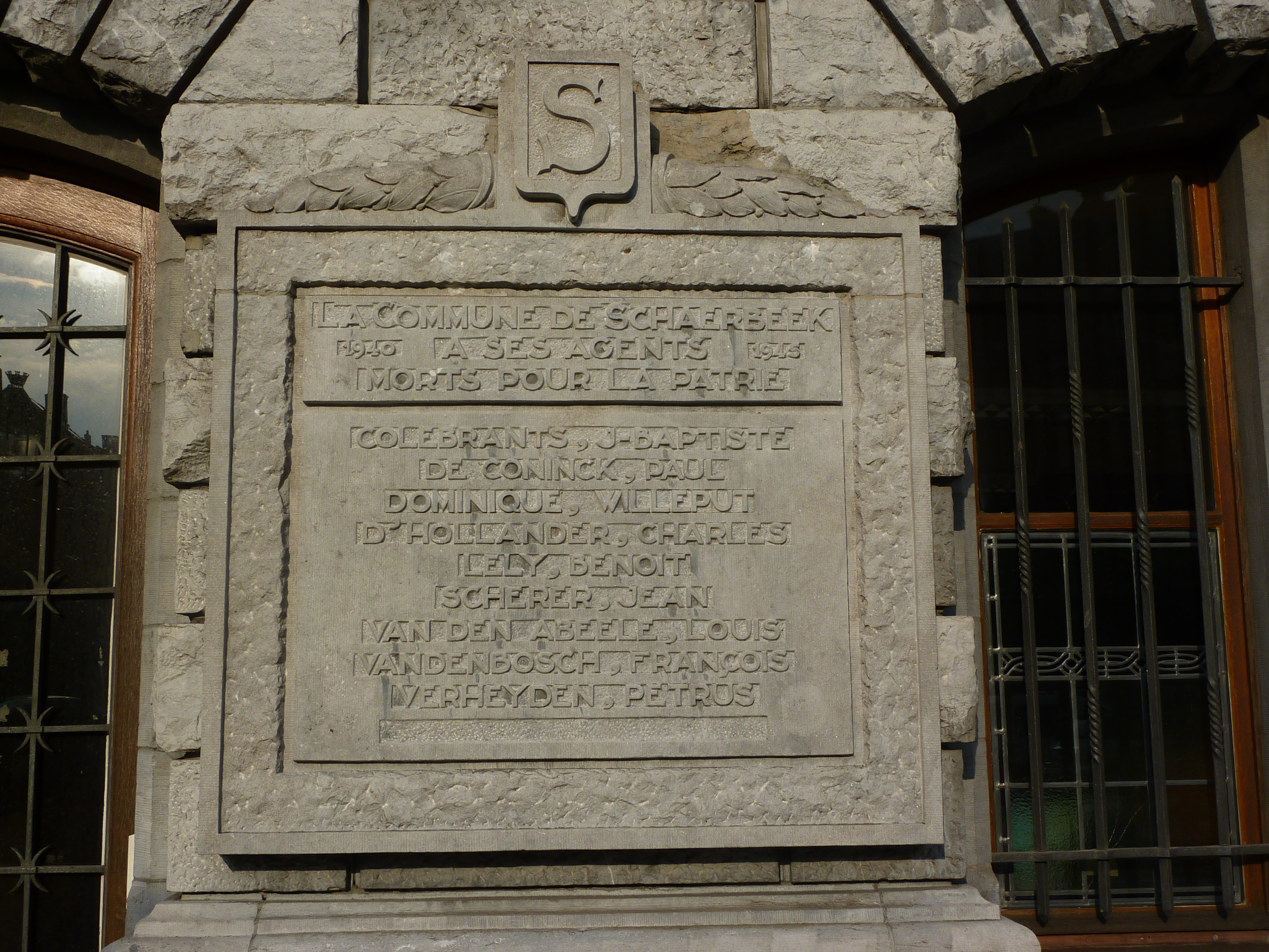 Plaque commémorative sur la façade de l'Hôtel communal de Schaerbeek à Bruxelles, Belgique.